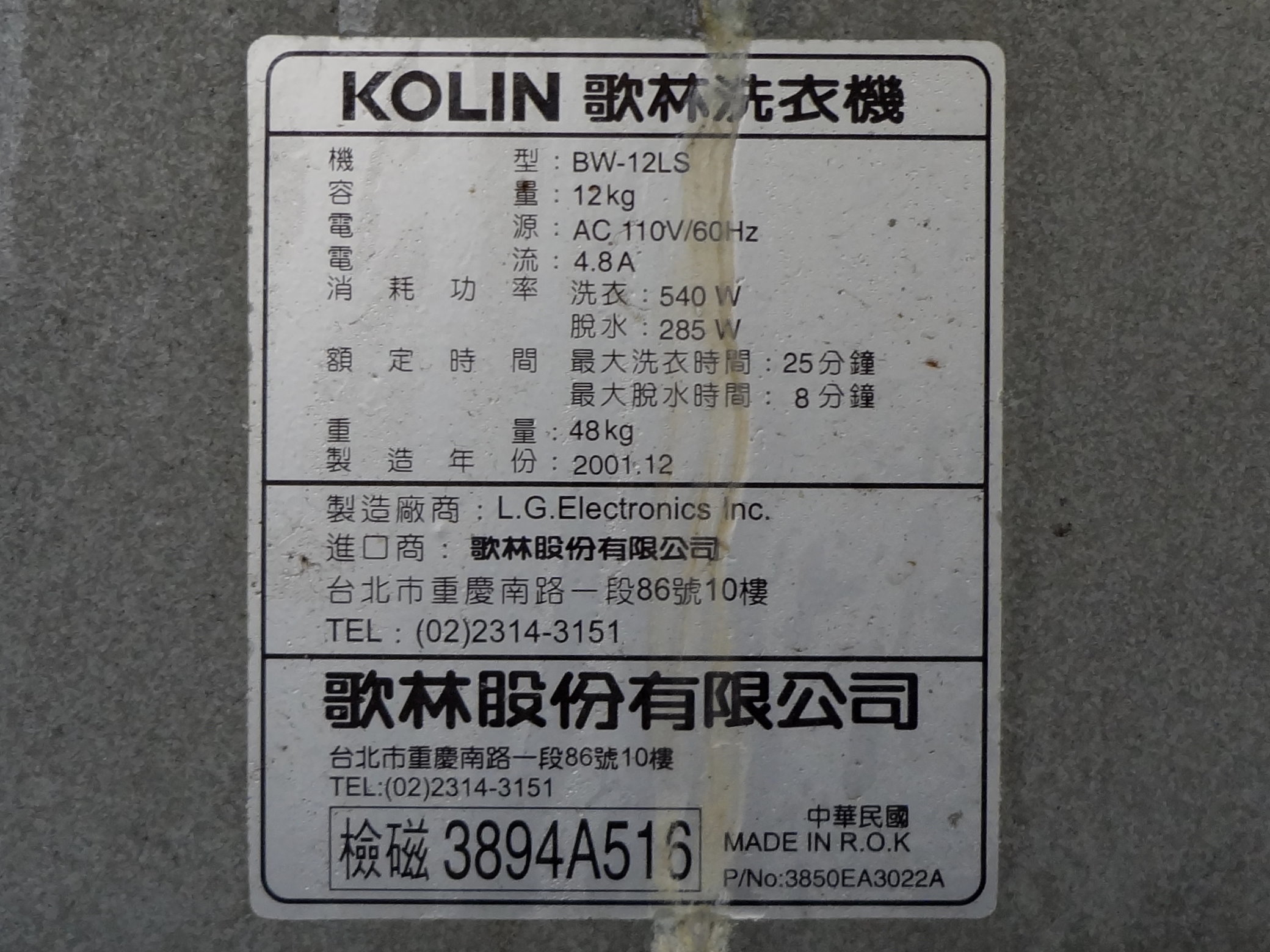 歌林洗衣機BW-12LS規格標籤，2001年12月製造，樂金電器代工。